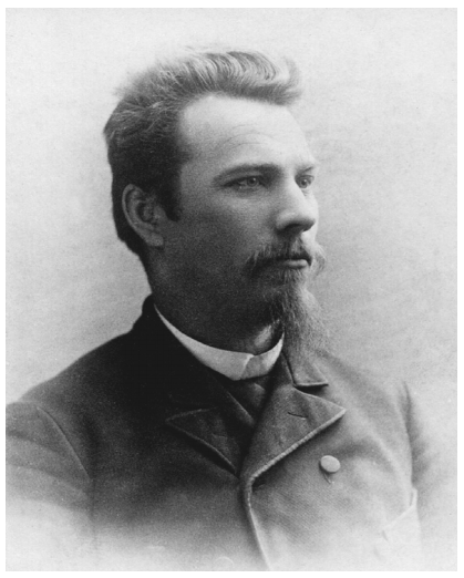 Егор Егорович Лазарев (псевдоним Бровинский; 12 апреля 1855, Самарская губерния — 23 сентября 1937, Прага) — народник, правый эсер, делегат Всероссийского Учредительного собрания, министр просвещения КОМУЧа, политэмигрант, редактор, автор мемуаров.